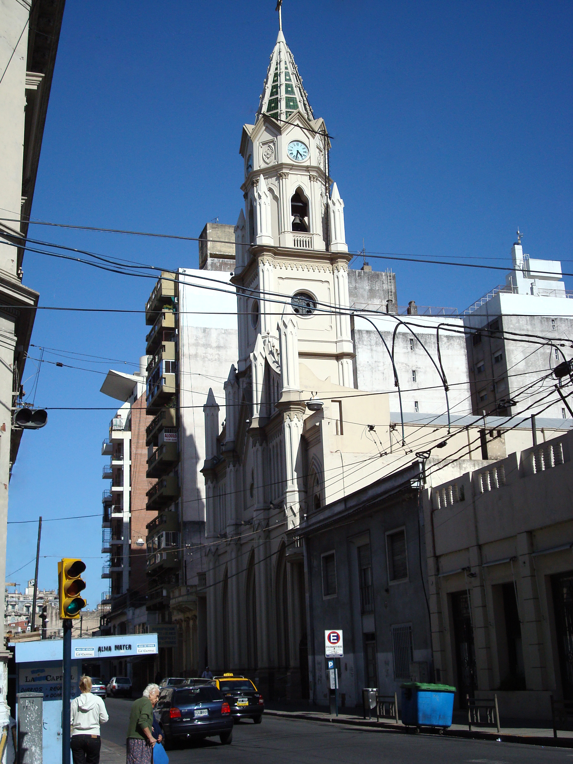 Iglesia de Santa Rosa de Lima en la ciudad de Rosario, Argentina. Es la segunda iglesia más antigua de la ciudad, se comenzó a construir en 1897 y fue inaugurada en 1909. Corresponde al período arquitectónico Eclecticismo-Academicismo. Fue declarado edificio de valor patrimonial por la Municipalidad de Rosario.